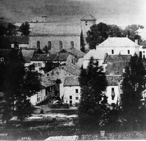 Esch-Uelzecht, 1860. Déi al Kierch St. Jean stoung do, wou haut d'Groussgaassschoul ass. Kategorie:Esch-Uelzecht